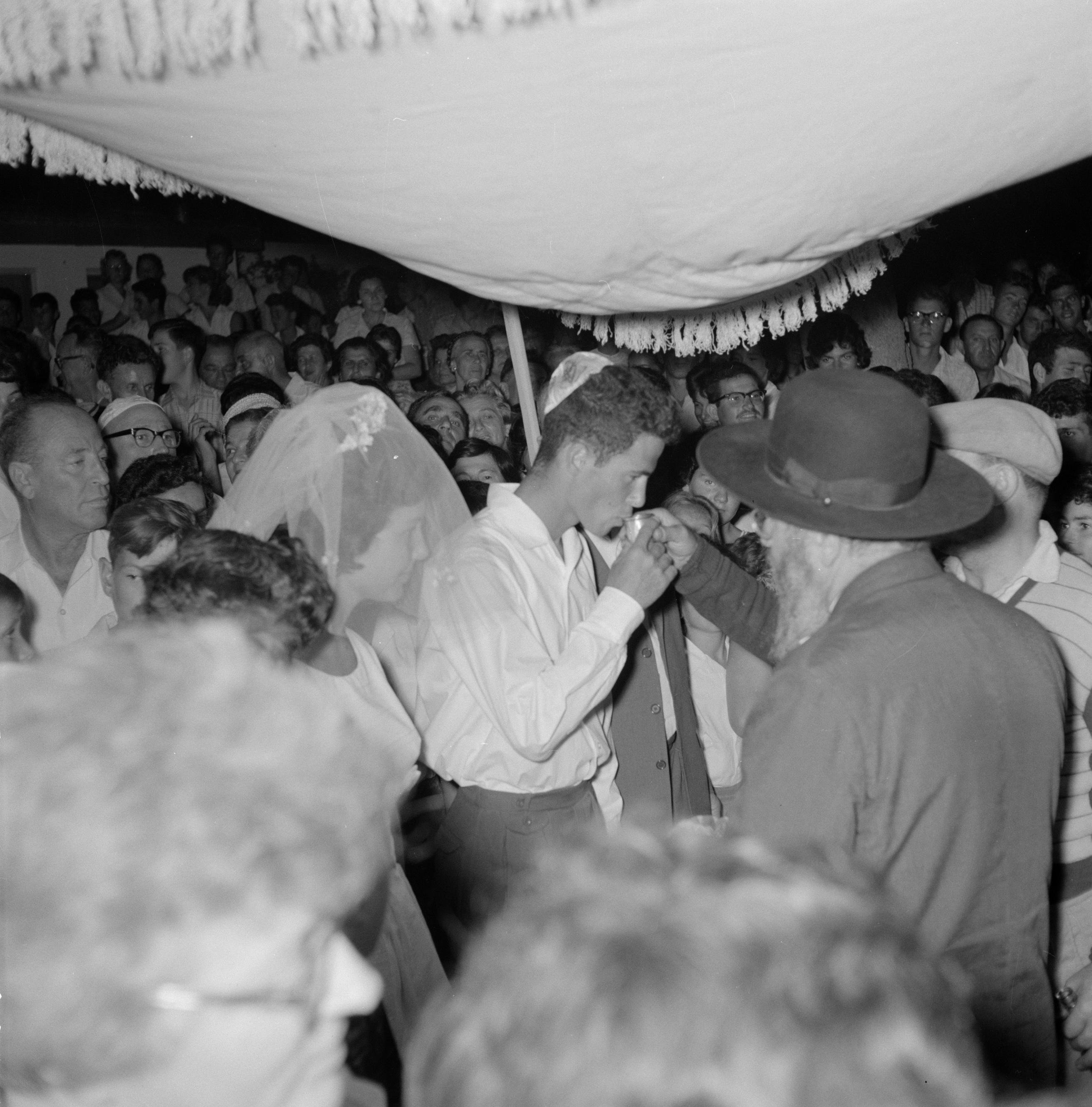 Collectie / Archief : Fotocollectie Van de Poll Reportage / Serie : [ onbekend ] Beschrijving : Bruiloft in de kibboets Yad Mordechai bij Asjkelon in het zuidwesten van Israel. Bruid en bruidegom tezamen onder de choepa terwijl de rabbijn de bruidegom wijn te drinken geeft Datum : 1 januari 1964 Locatie : Asjkelon, Israël, yad mordechai Trefwoorden : hoofddeksels, huwelijksvoltrekkingen, joodse religie, kibboetsen, rabbijnen, wijn Fotograaf : Poll, Willem van de Auteursrechthebbende : Nationaal Archief Materiaalsoort : Negatief (zwart/wit) Nummer archiefinventaris : bekijk toegang 2.24.14.02 Bestanddeelnummer : 255-4193